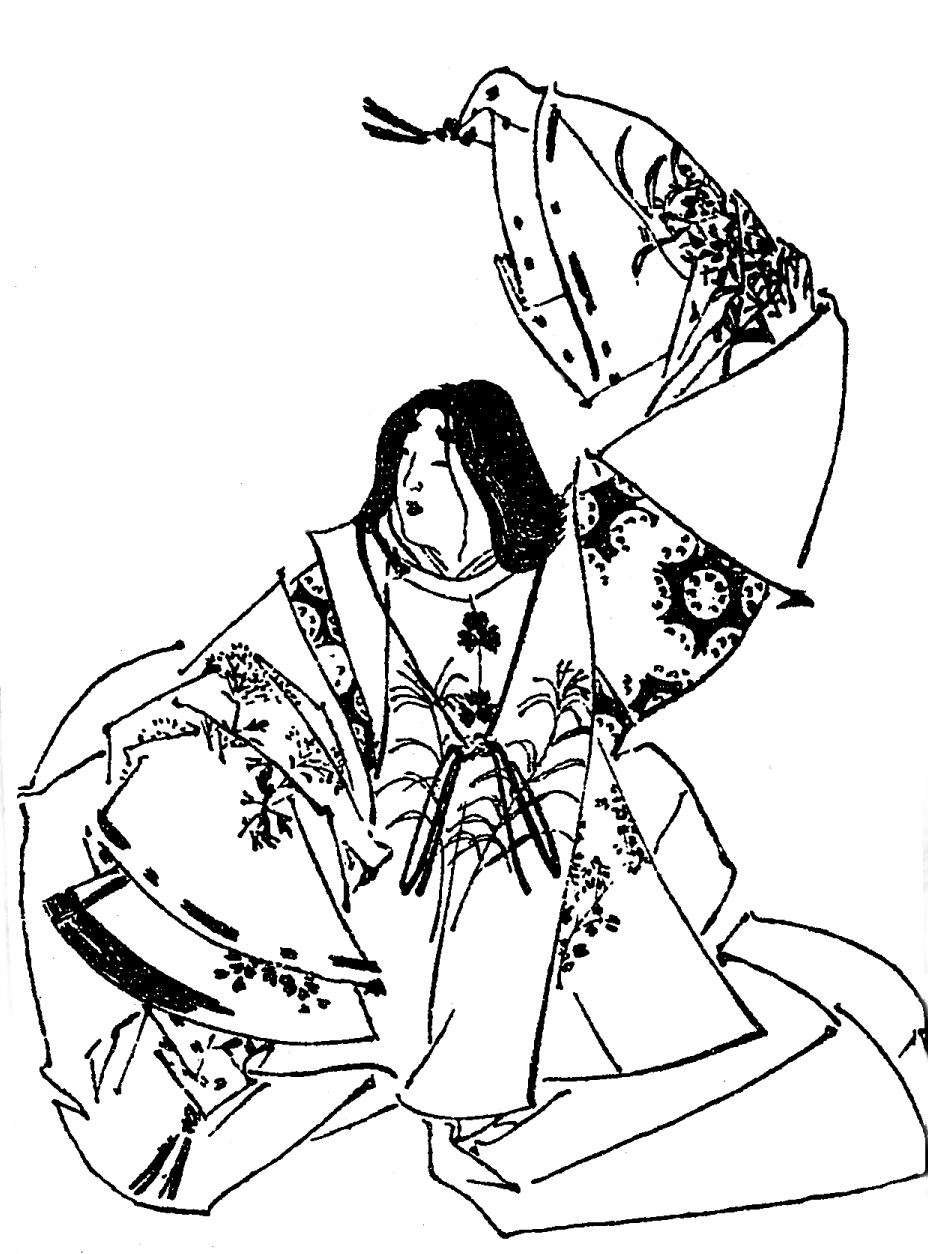 微妙。鎌倉時代の白拍子。／江戸時代『前賢故実』より。画：菊池容斎